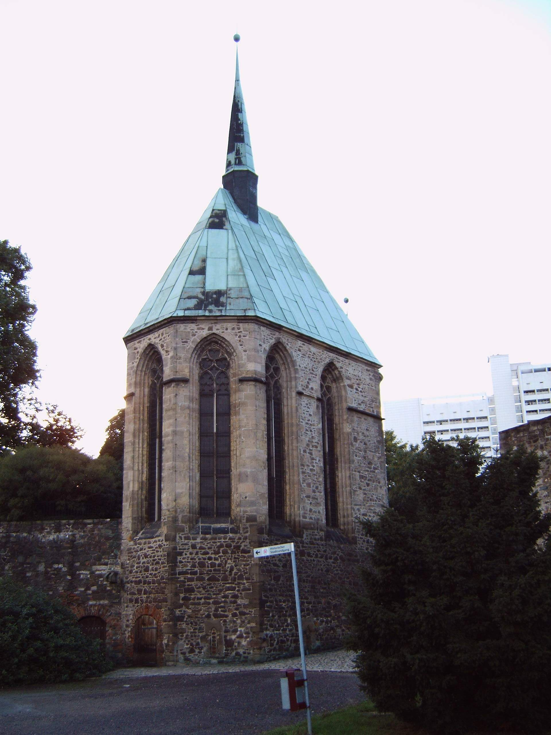 Magdalenenkapelle in Magdeburg, Ostseite